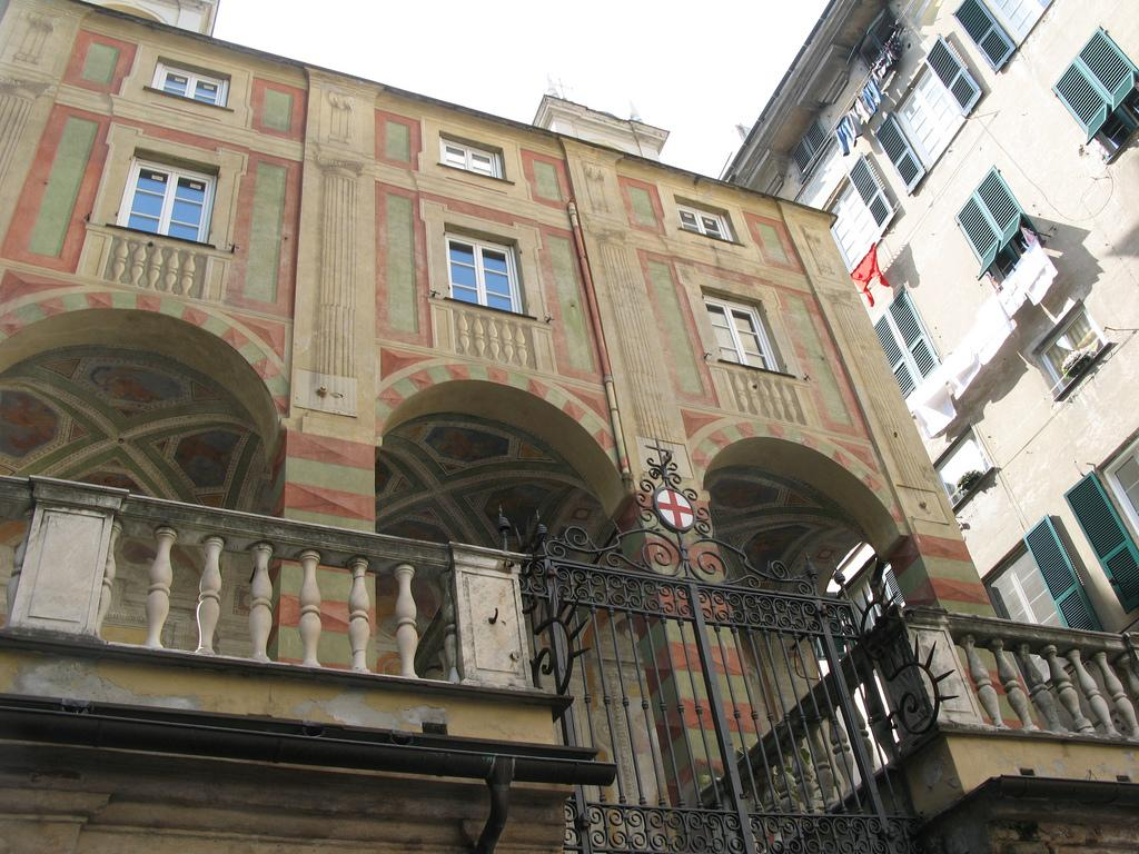 Chiesa di San Pietro in Banchi, Genova, Liguria, Italia